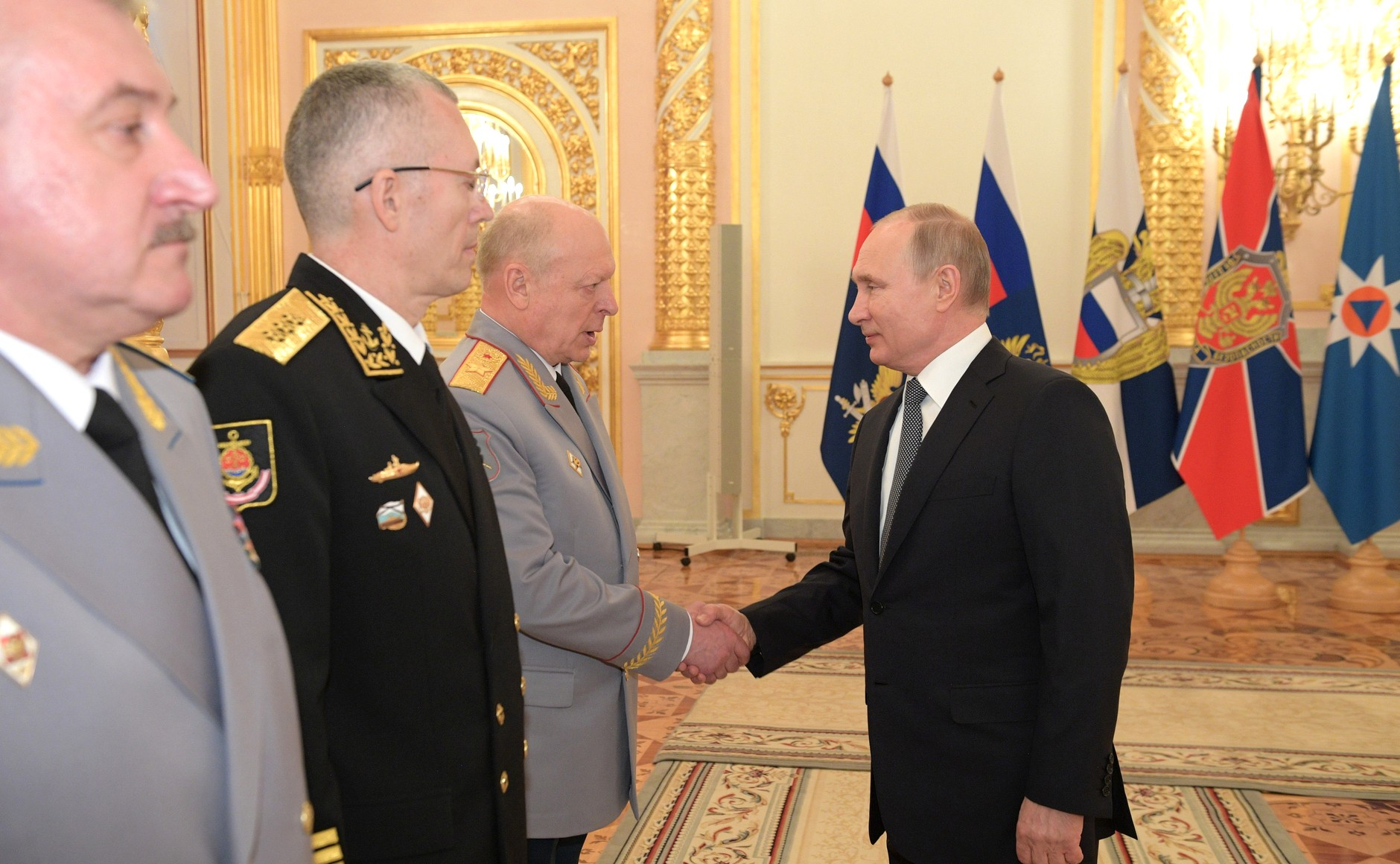 Церемония представления офицеров, назначенных на высшие командные должности.